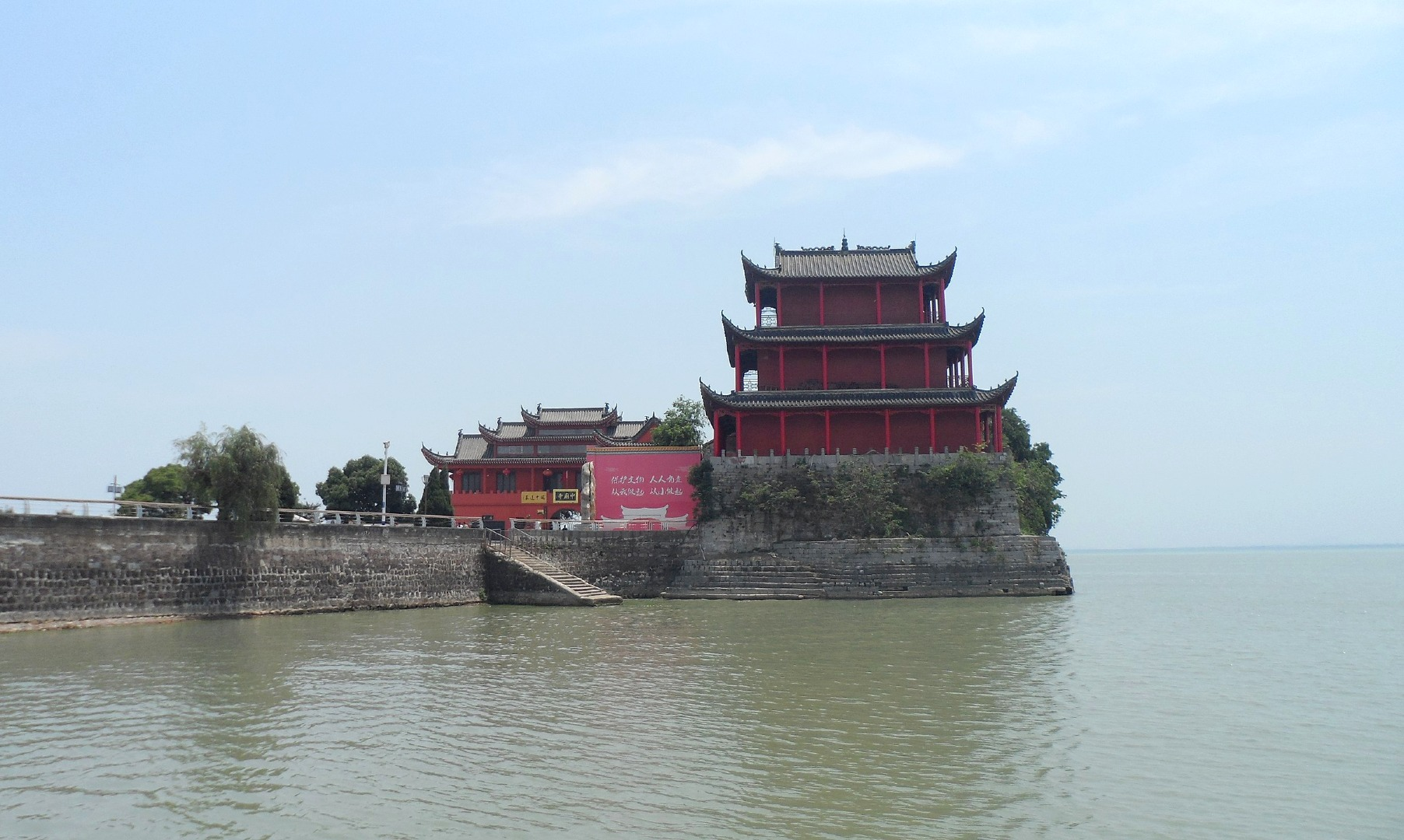 安徽巢湖中庙